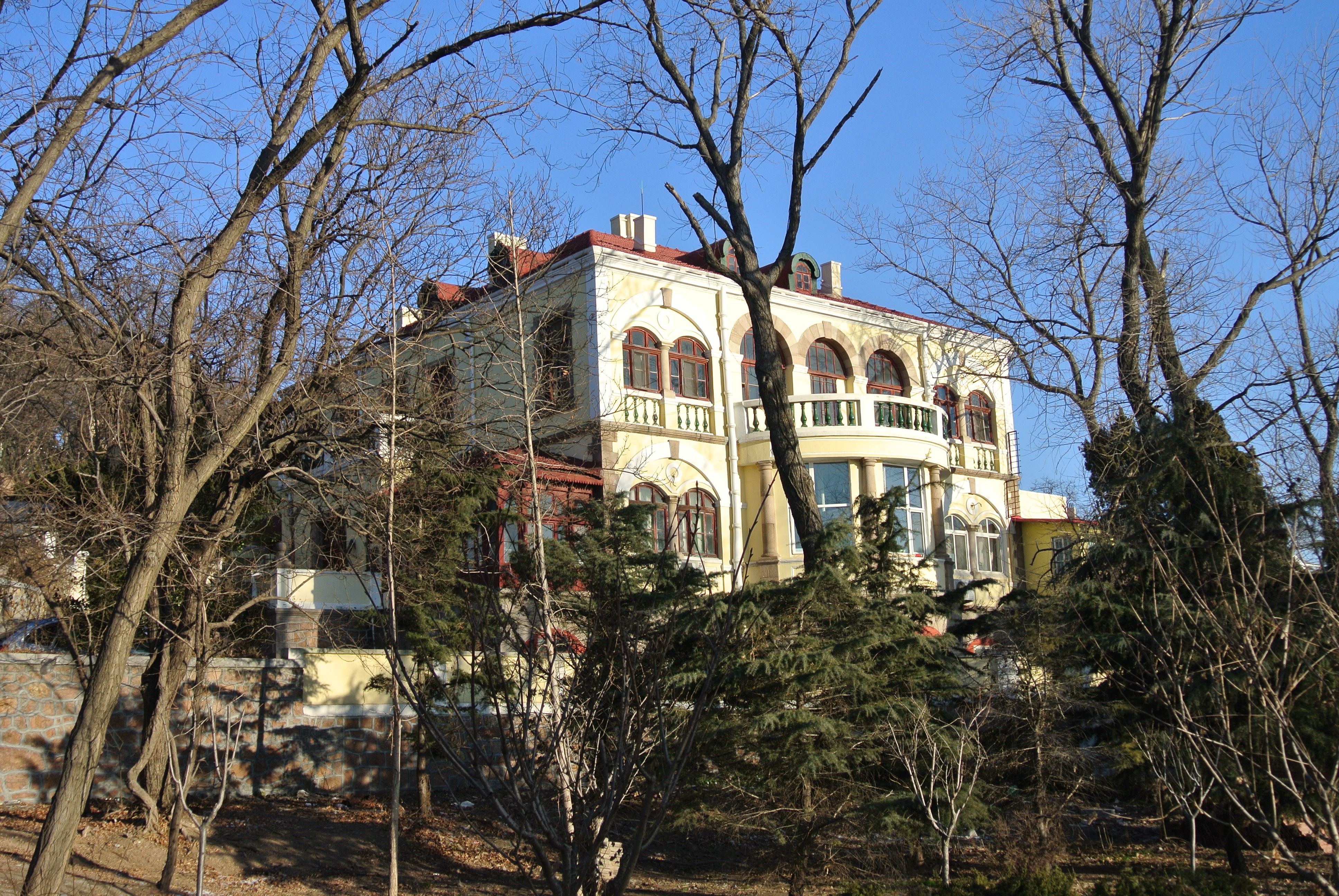 青岛胶海关税务司阿理文住宅旧址